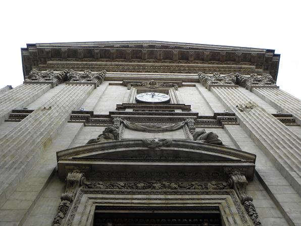 Façade de l'église St-Polycarpe de Lyon